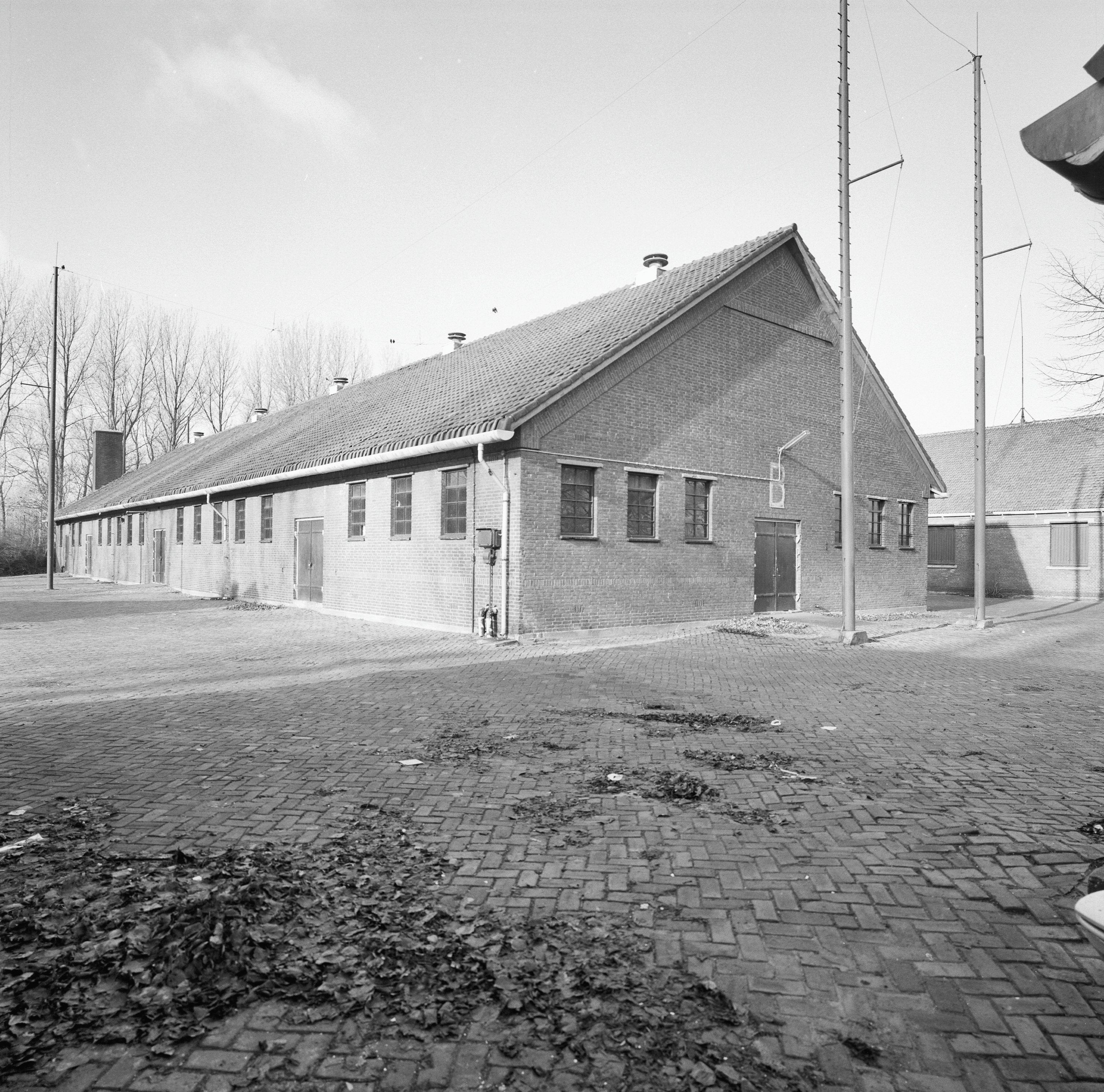 Munitiecomplex De 1800-Roeden: Exterieur OVERZICHT